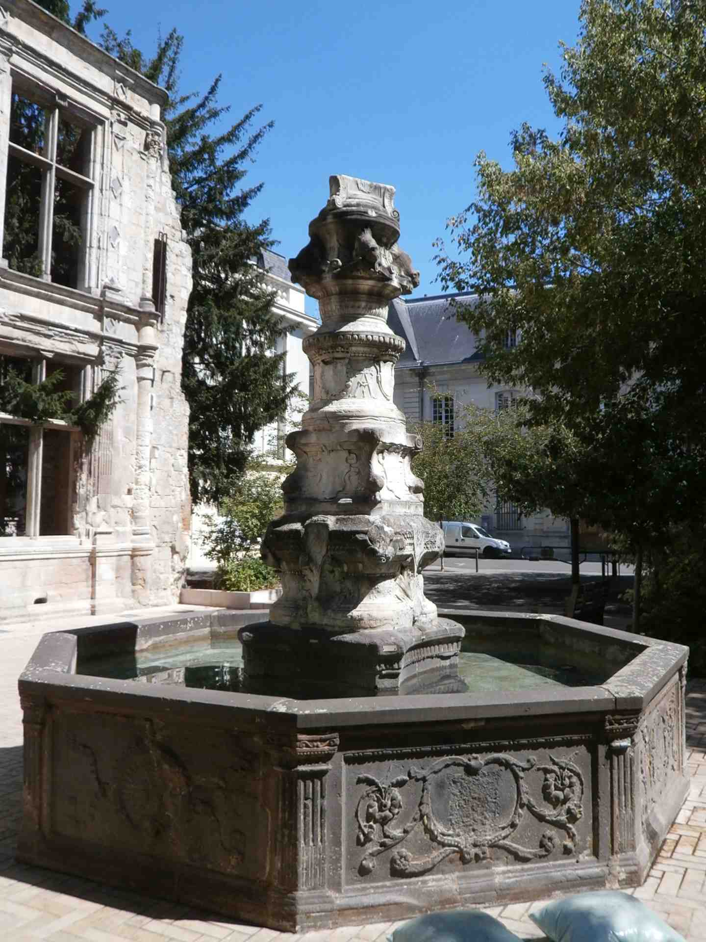 Fontaine de Beaune-Semblançay à Tours décapitée après un acte de vandalisme.